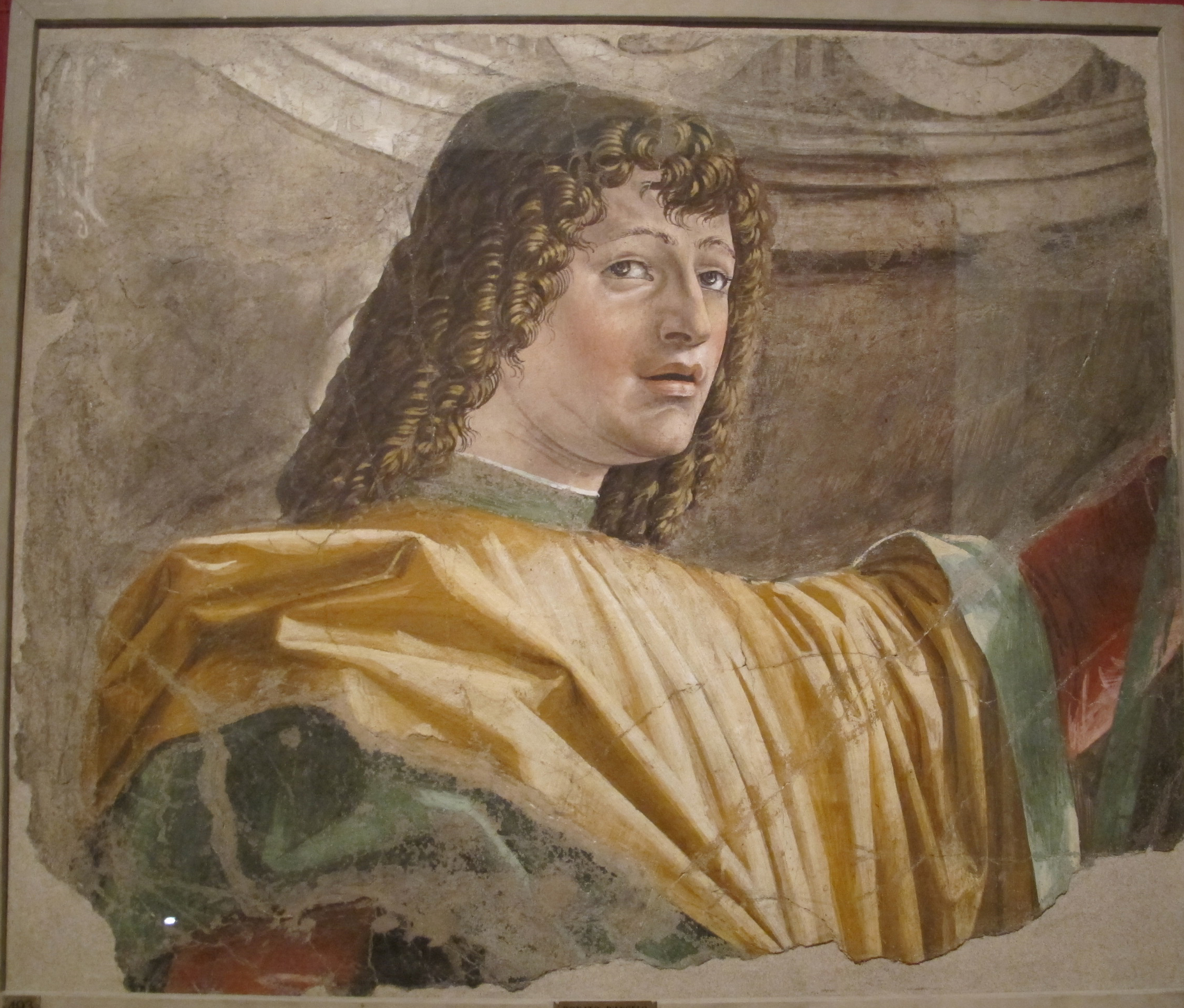 detail